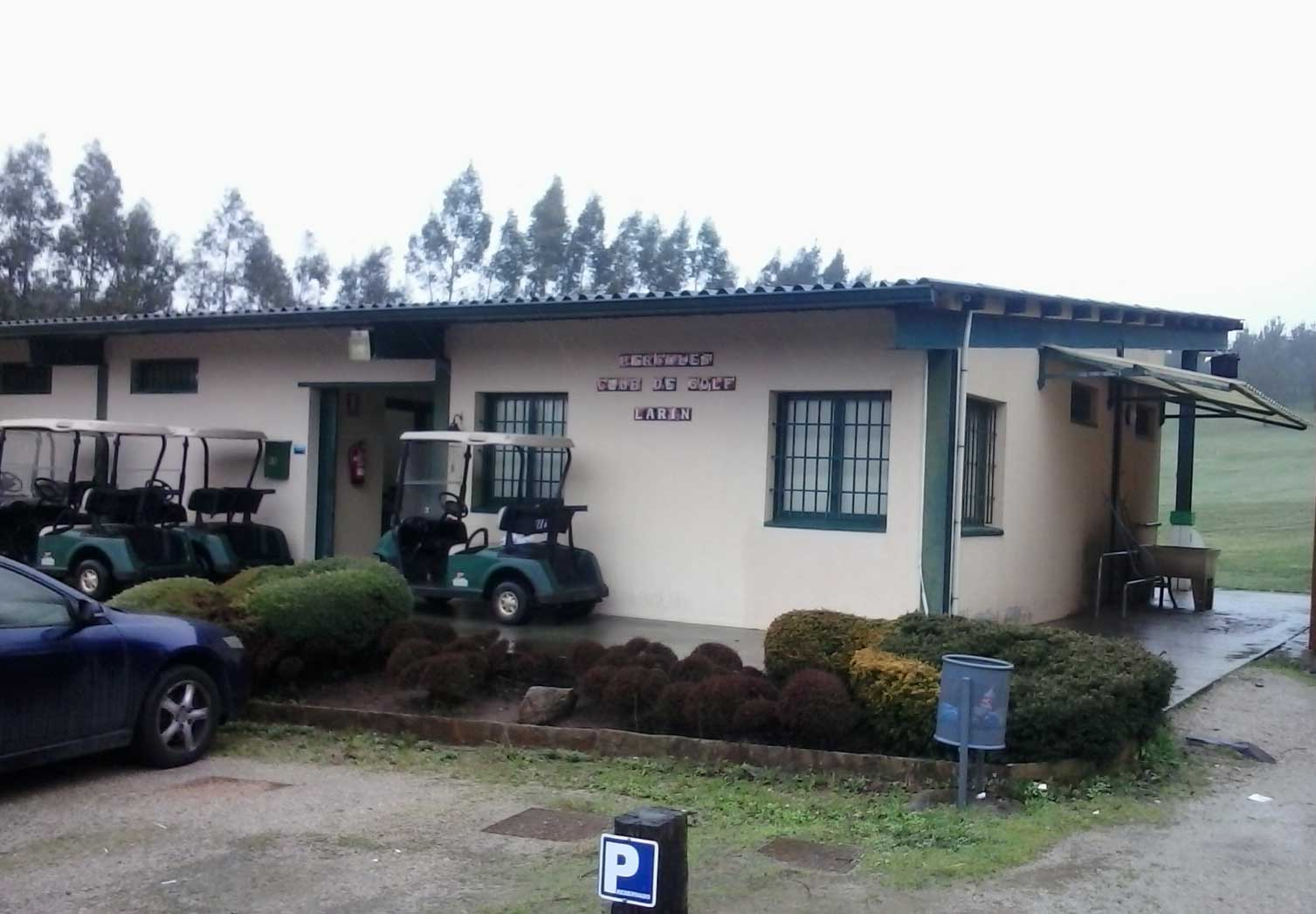 Campo de golf de Larín